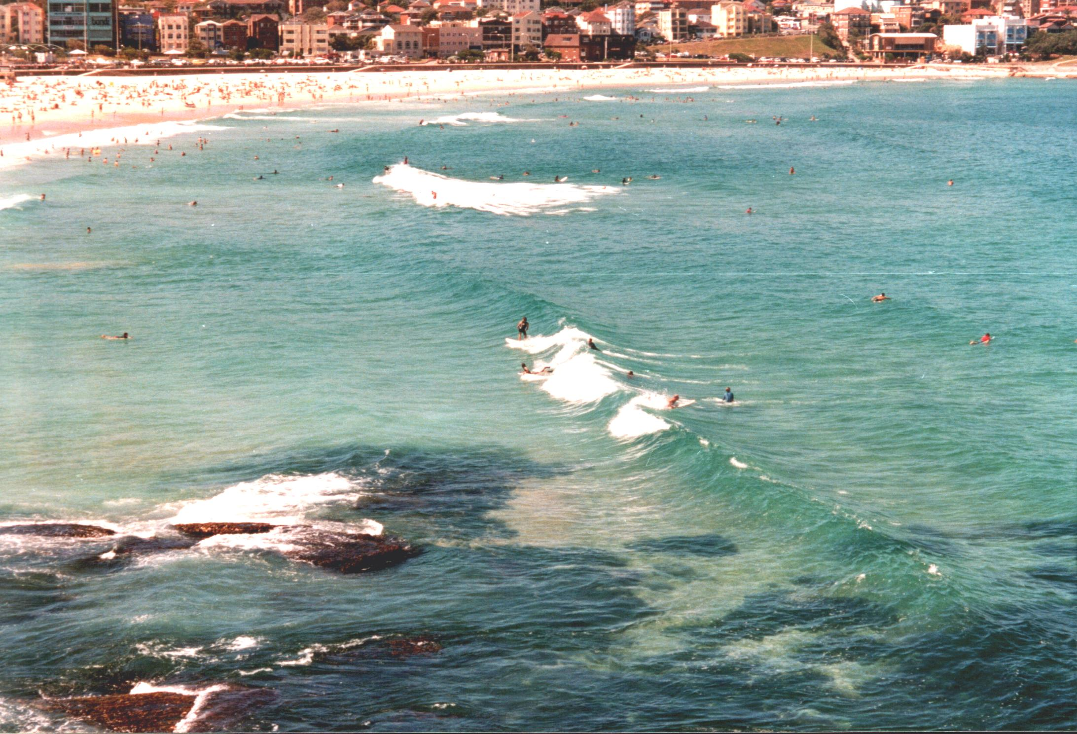 Bondi Beach Surfing Sydney